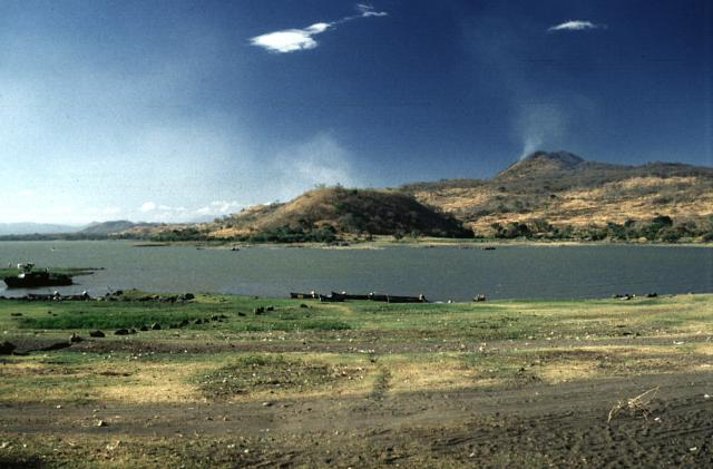 Volcán de San Diego (upper right) in El Salvador.